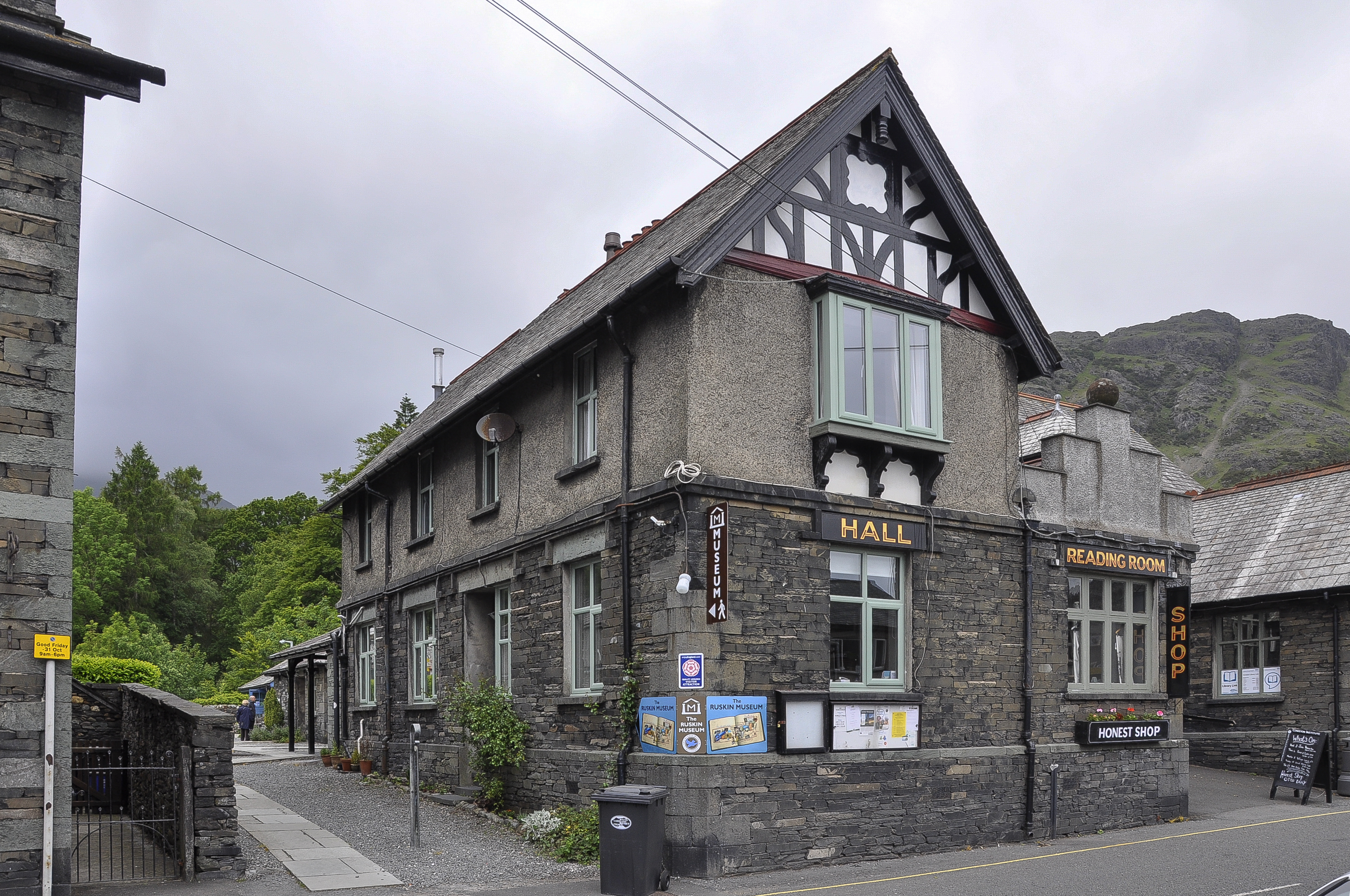 Het Ruskin Museum in Coniston, Engeland